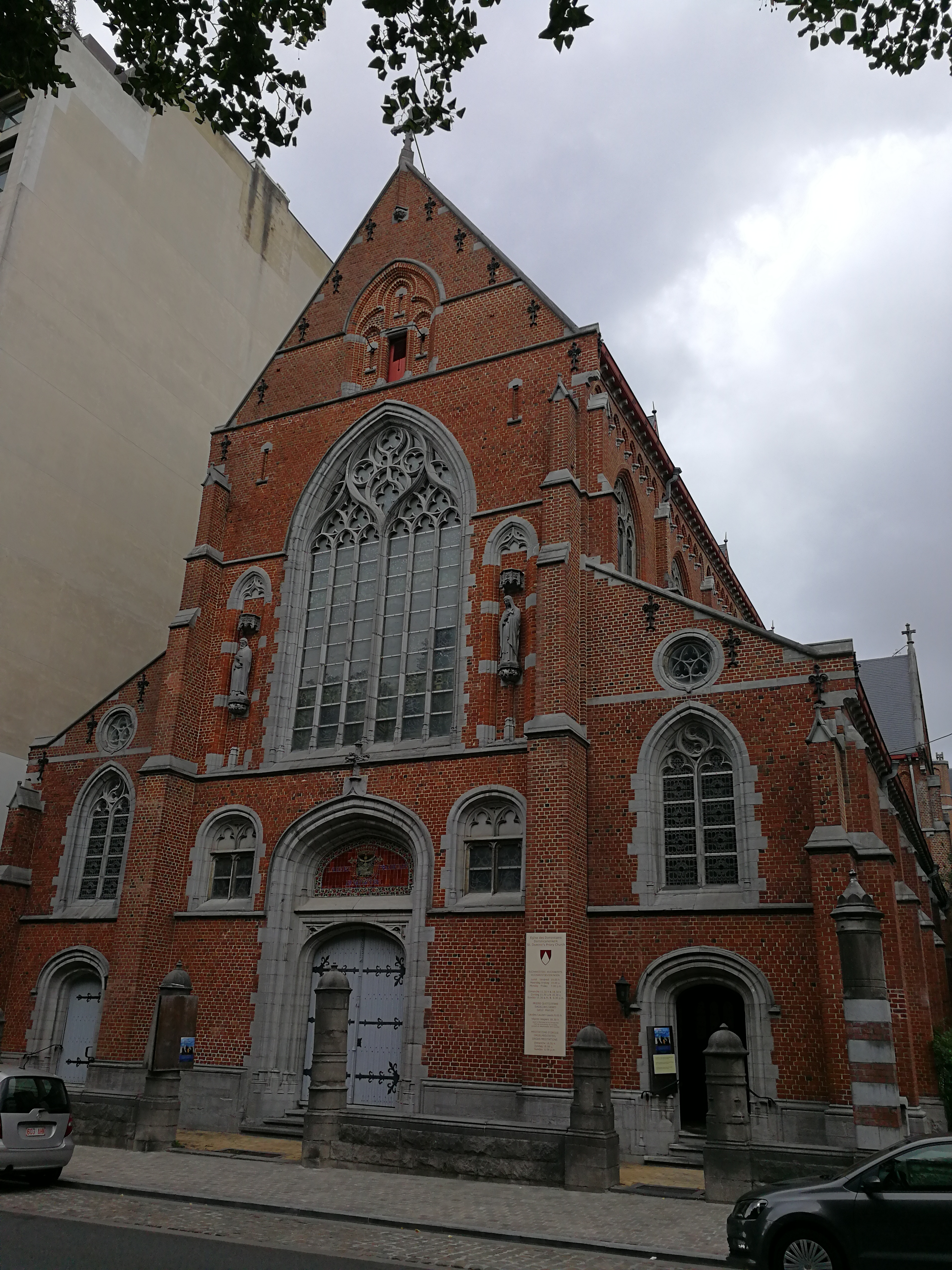 Église Saint-Dominique de Bruxelles